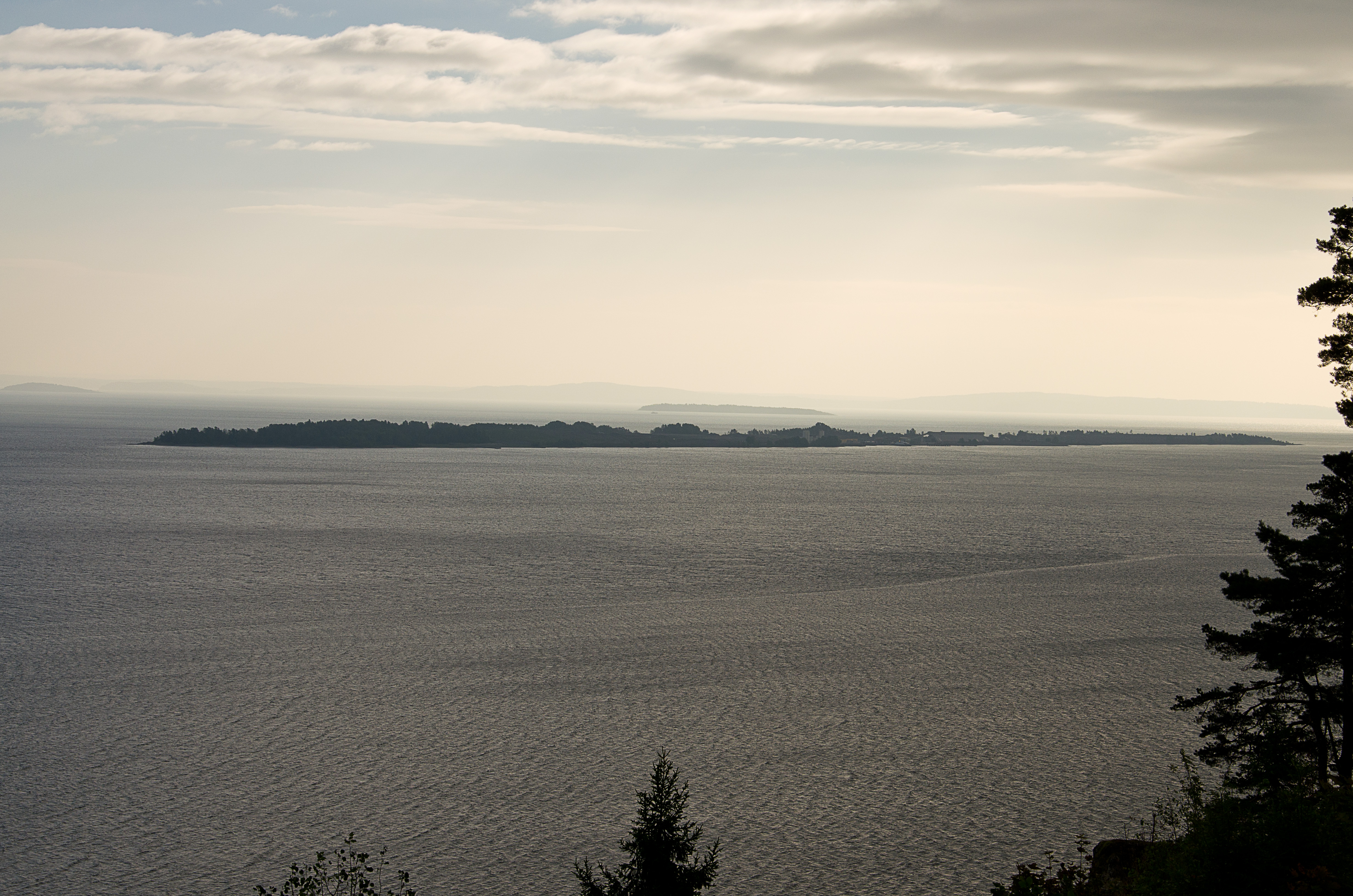 Langøya ligger i Oslofjorden, og har fergeforbindelse til Holmestrand. Øya tilhører Re kommune.